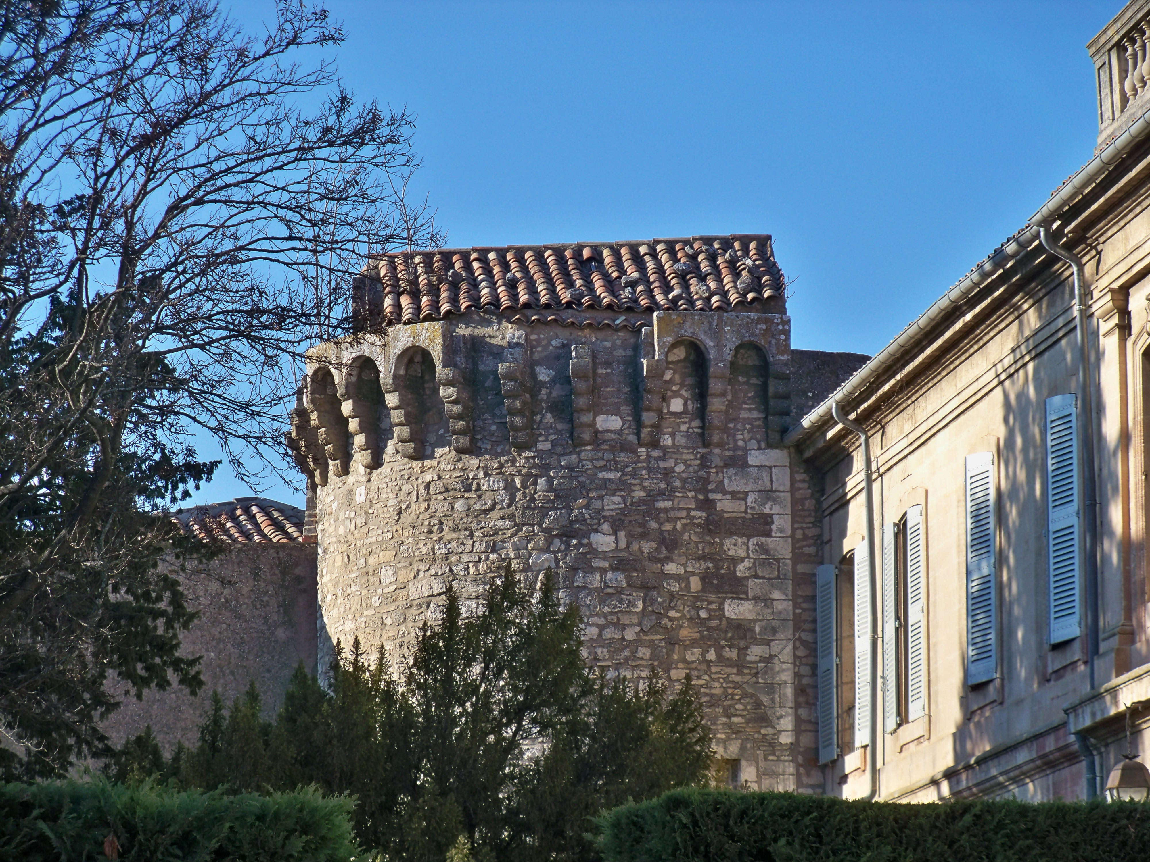 ancienne tour dans les jardins de la sous-préfecture d'Apt, Vaucluse, France